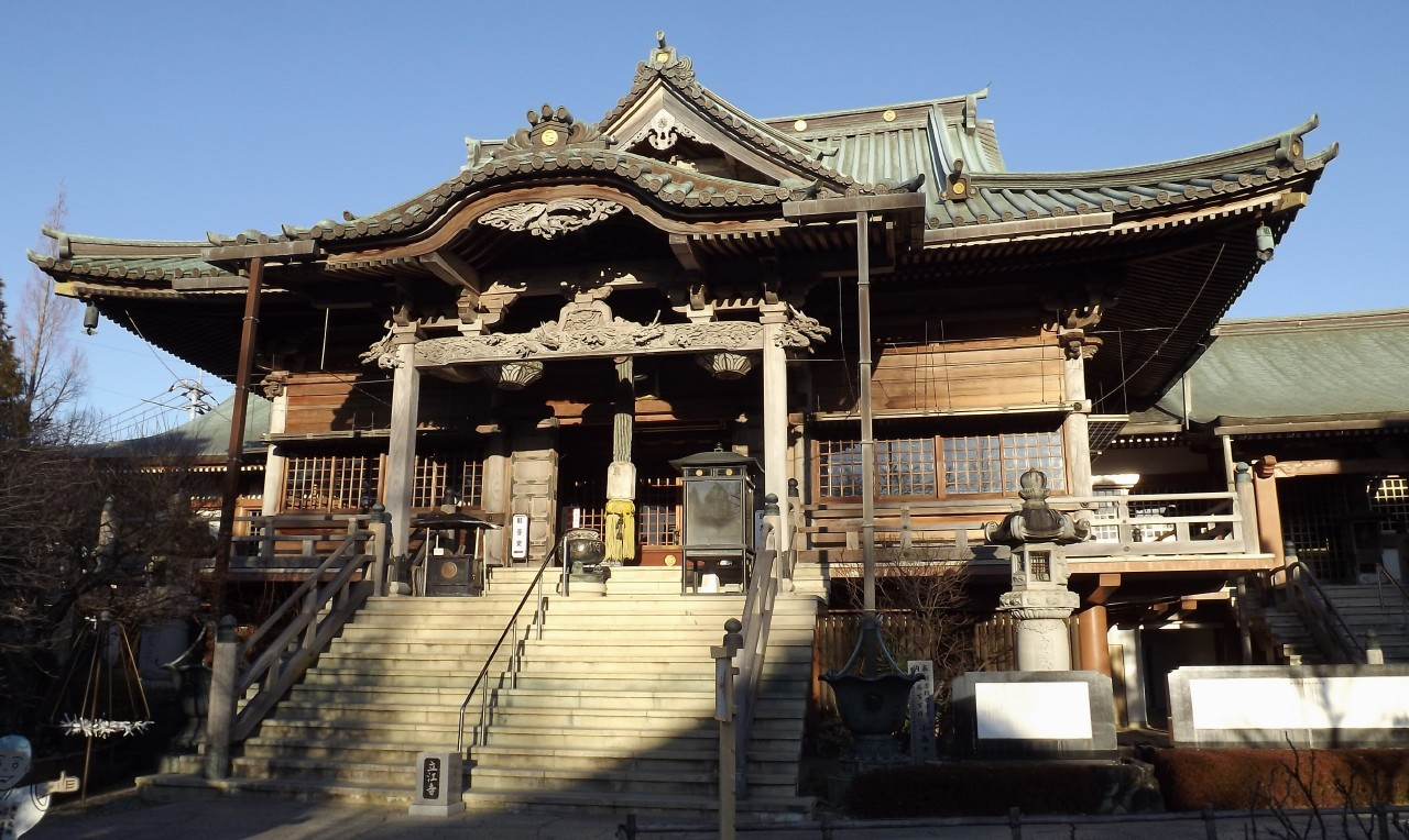 立江寺の本堂